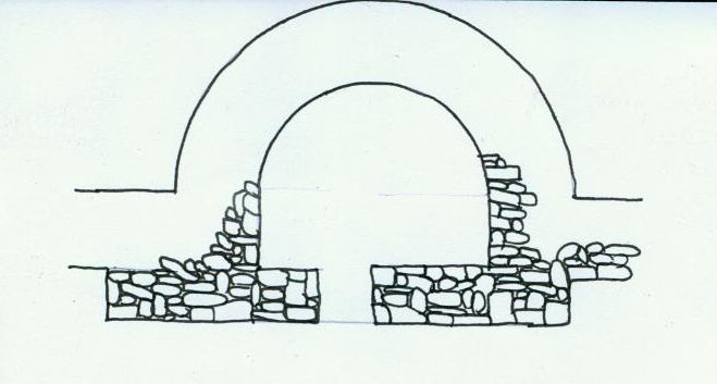 Steingerechte Aufnahme der Befunde von Turm VI, Kastell Pfyn/Ad Fines (CH), 1981.